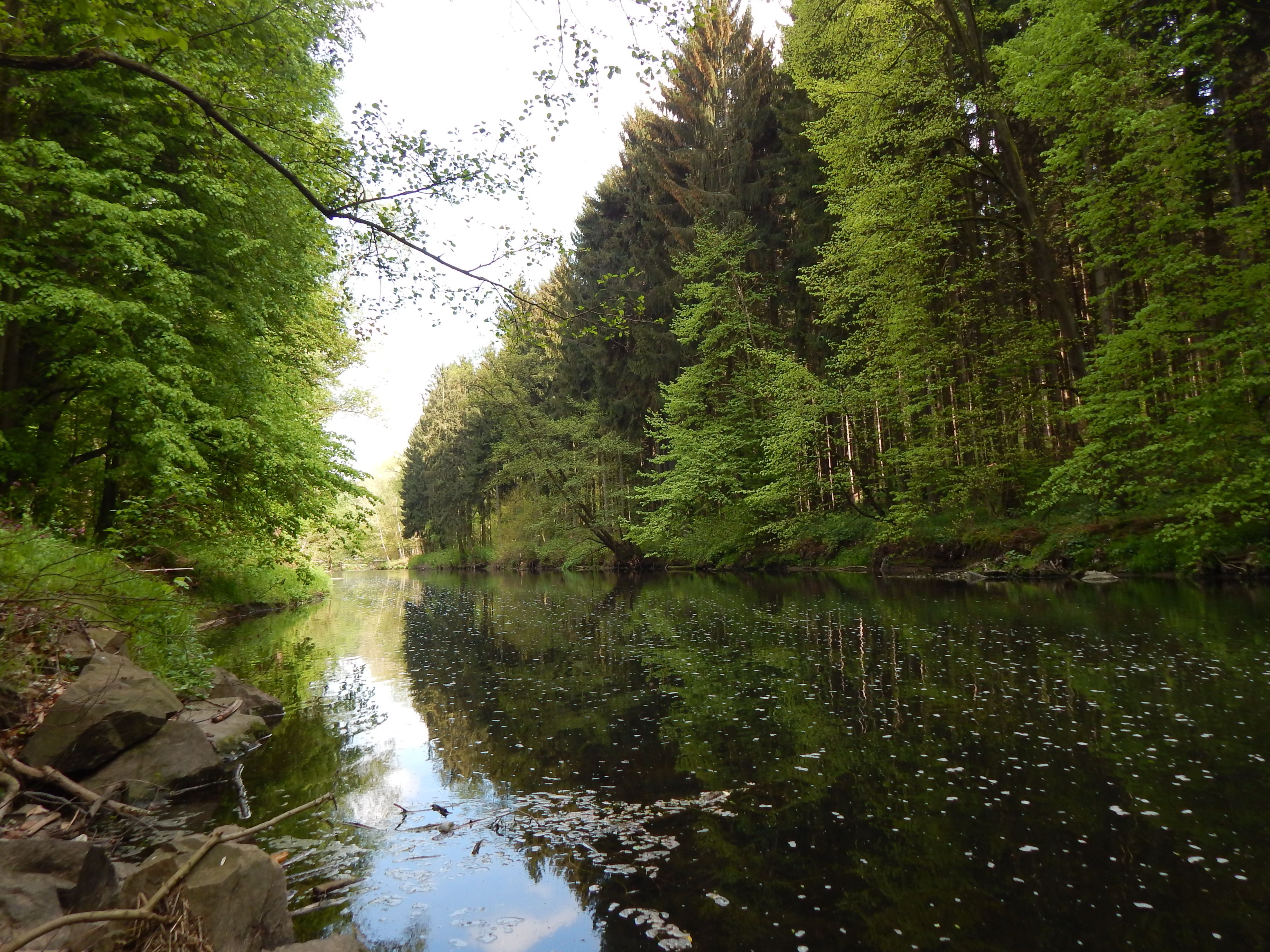 Chemnitzfluss unterhalb vom Schusterstein